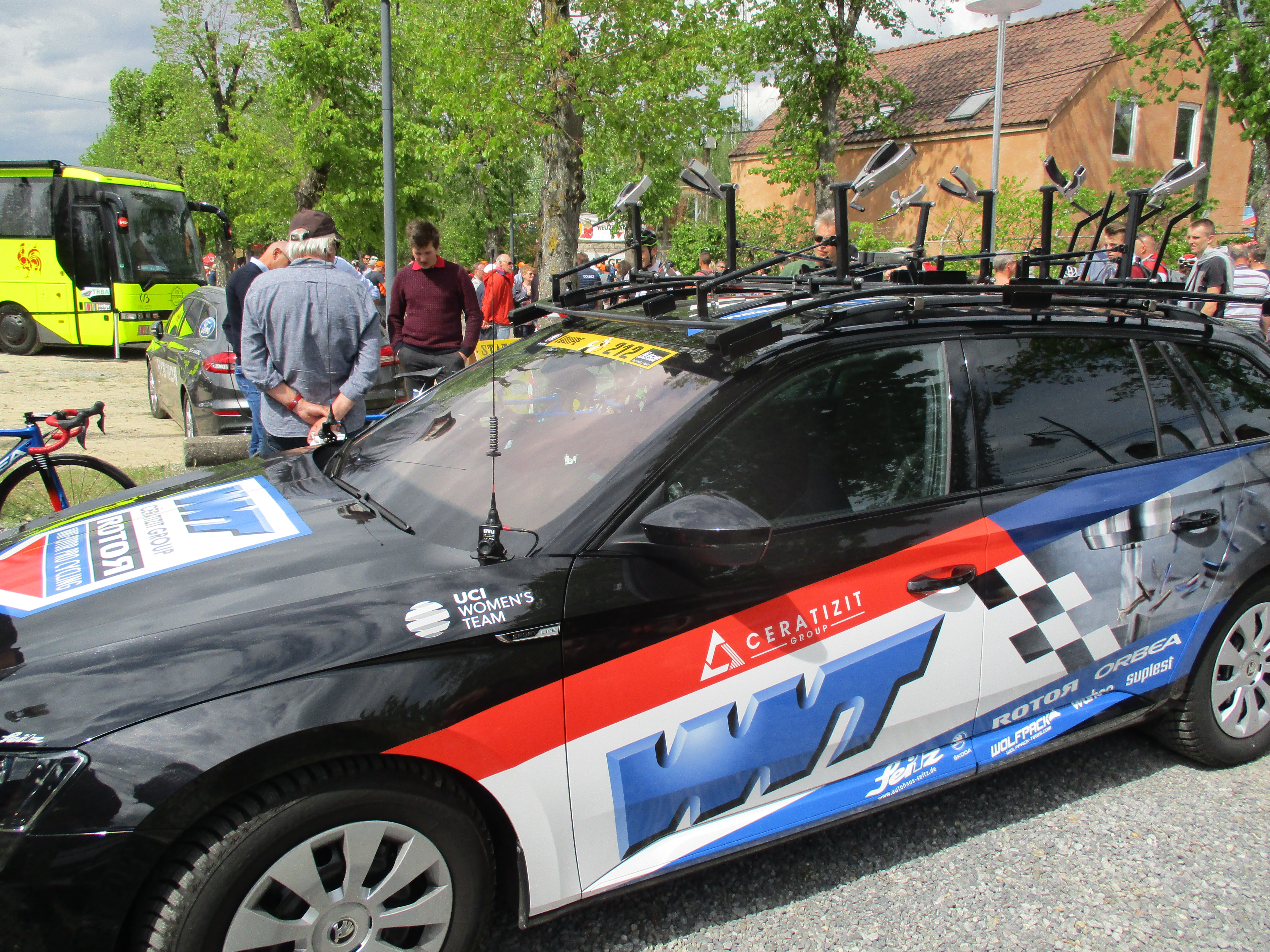 Waalse Pijl 2019 voor vrouwen op de Mur de Huy